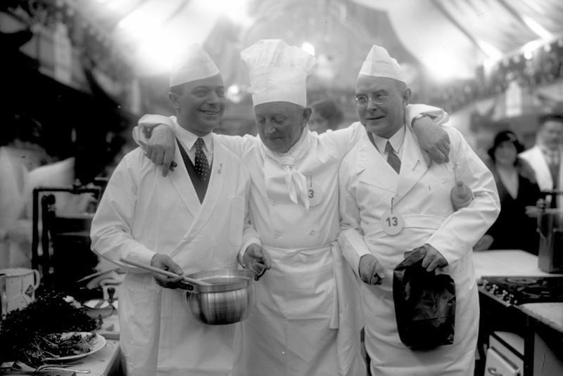 Prominente Bühnen- und Filmschauspieler als Kochkünstler auf der Kochkunstausstellung am Kaiserdamm! Ein lustiges Trio, die Filmschauspieler Paul Heidemann (links), Otto Gebühr (Mitte) und Wilhelm Bendow auf der Kochkunstausstellung.